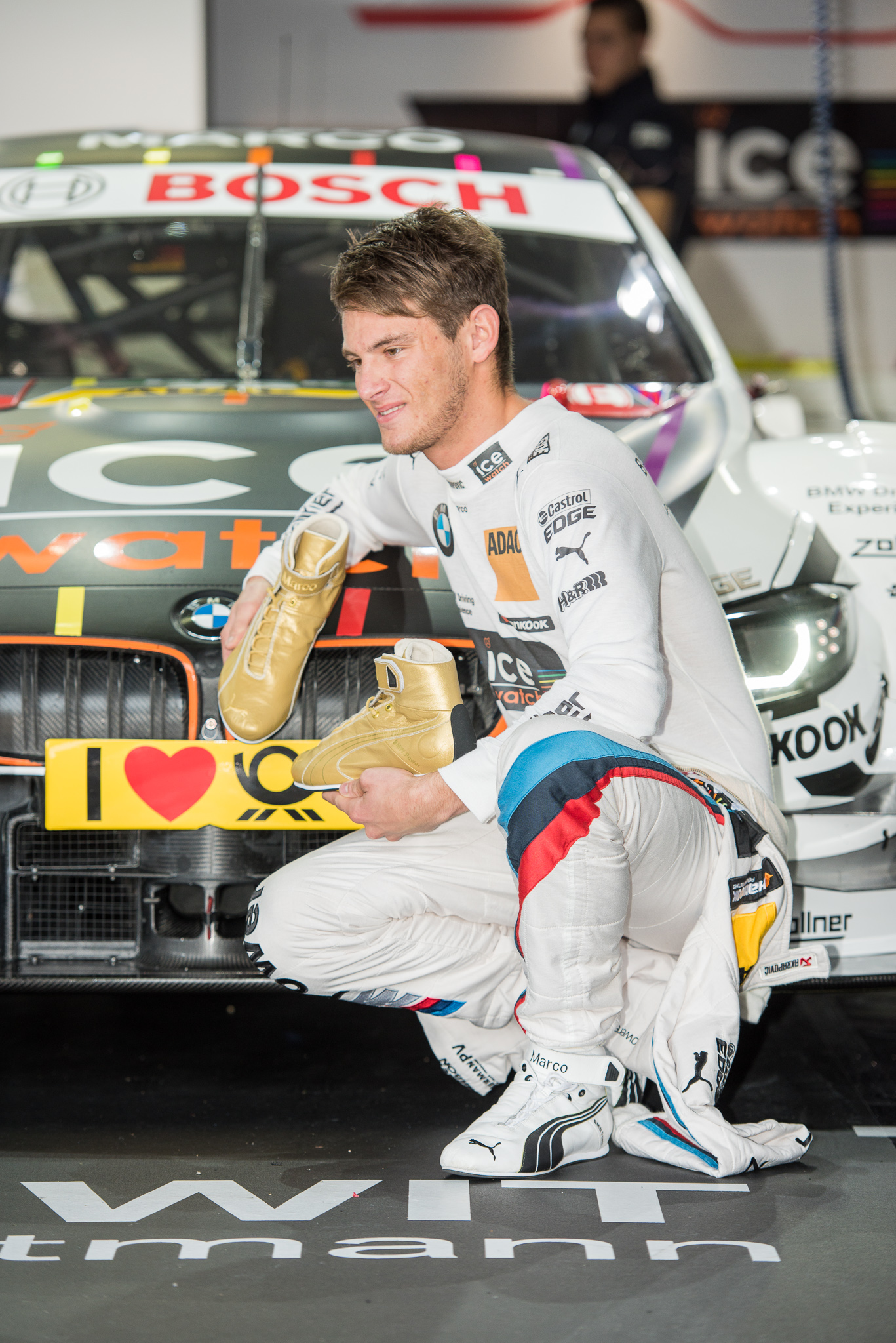 Box,Boxengasse,DTM,Deutsche Tourenwagen Masters,Hockenheimring,Ice-Watch BMW M4 DTM,Marco Wittmann,Motorsport,RMG,Reinhold Motorsport GmbH